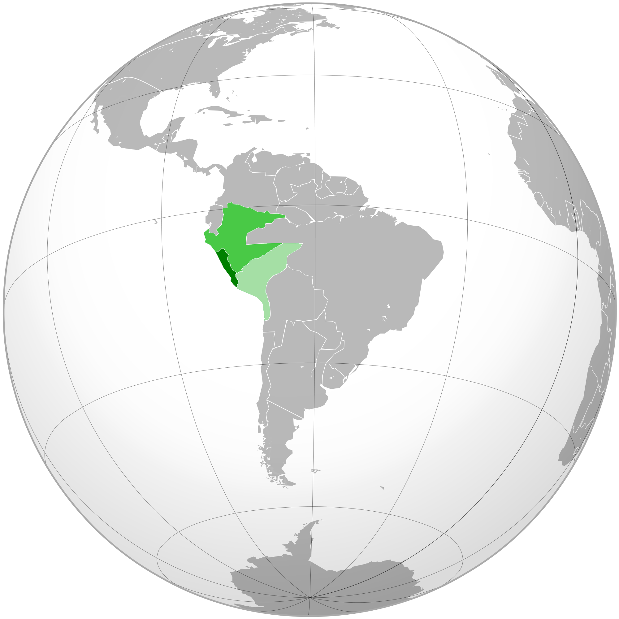 La República Peruana de 1838-1839